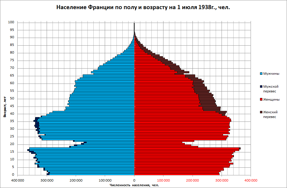 Демографическая пирамида Франции в 1938 г.